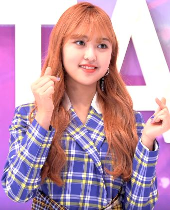 4일 오후 서울 마포구 상암동 tbs 오픈스튜디오에서 ‘tbs 팩트인스타 - ‘체리블렛’편 녹화가 펼쳐져 체리블렛 미래가 포토타임을 갖고 있다.